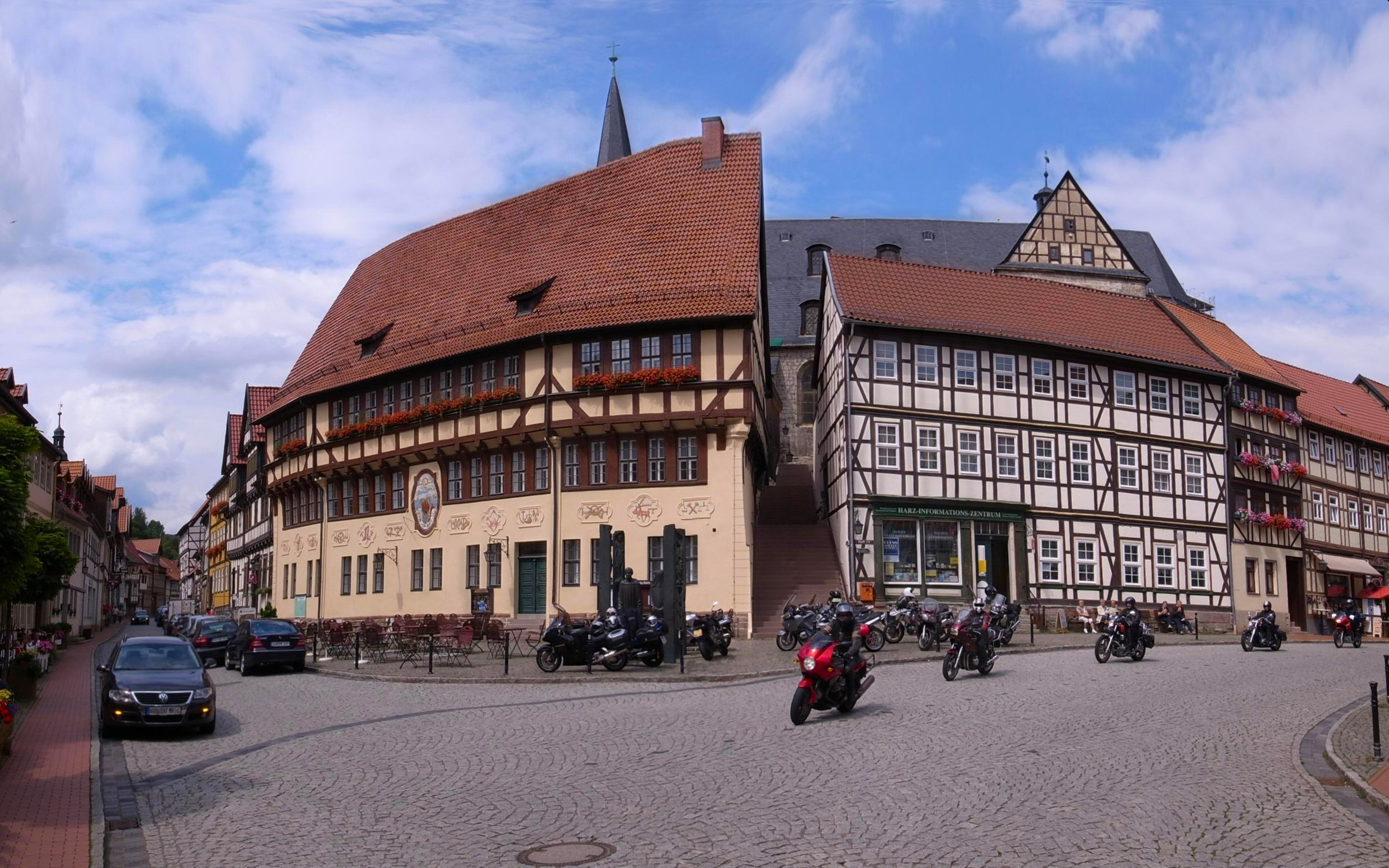 Stolberg (Harz), Rathaus am Markt